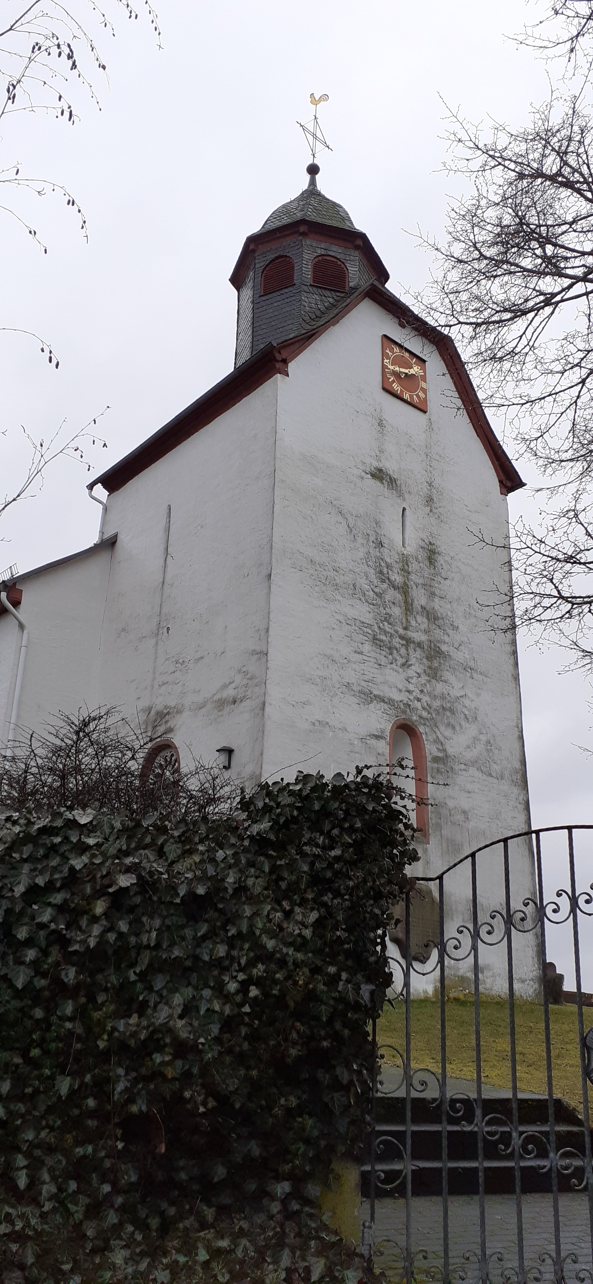 Romanischer Chorturm der Evangelischen Kirche in Großaltenstädten